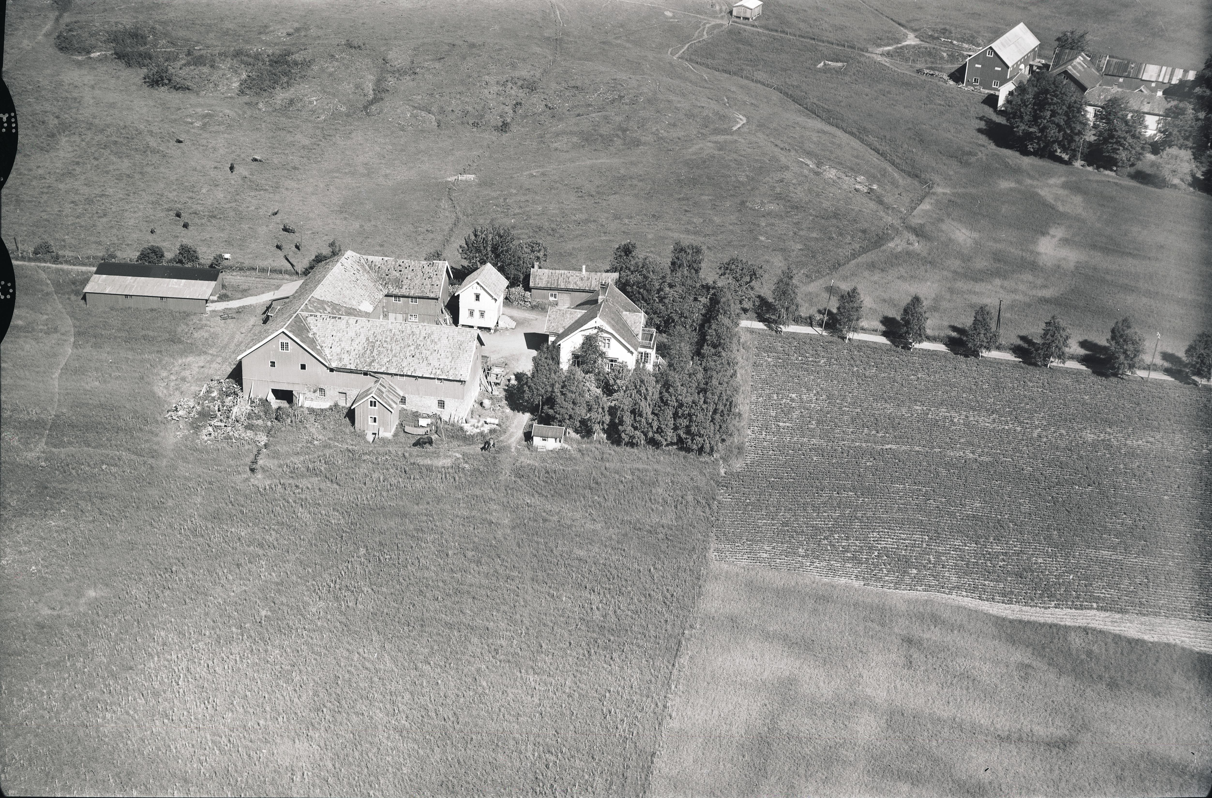 Havstad gård på Byåsen.